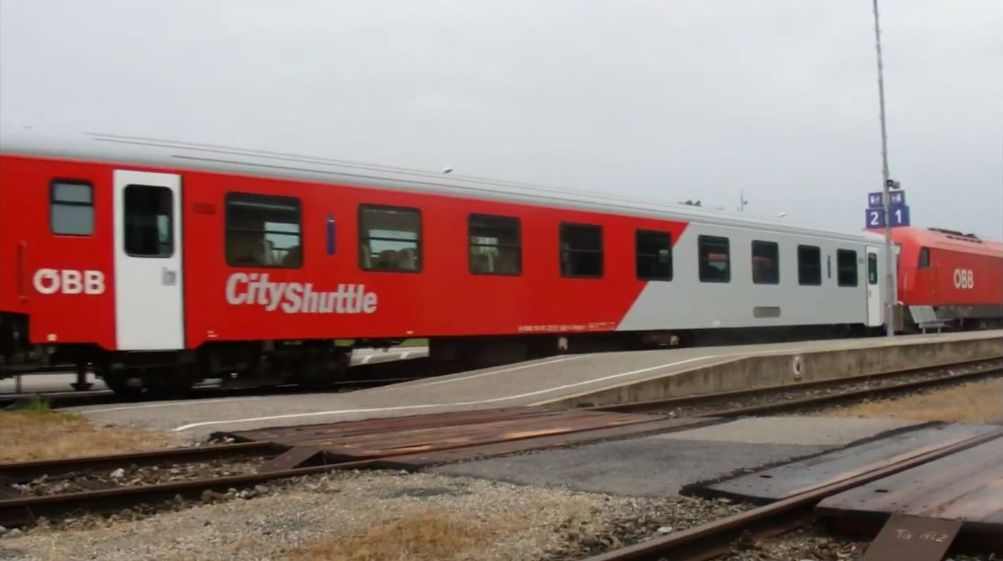 ÖBB CityShuttle mit Dosto Schriftzug in Friedberg.